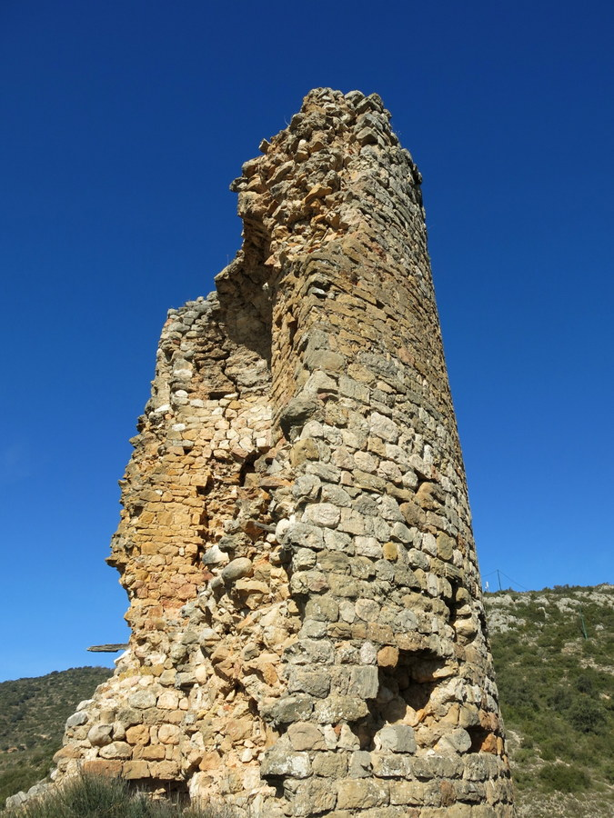 Castell d' Alós, Alós de Balaguer, comarca de la Noguera - Catalunya